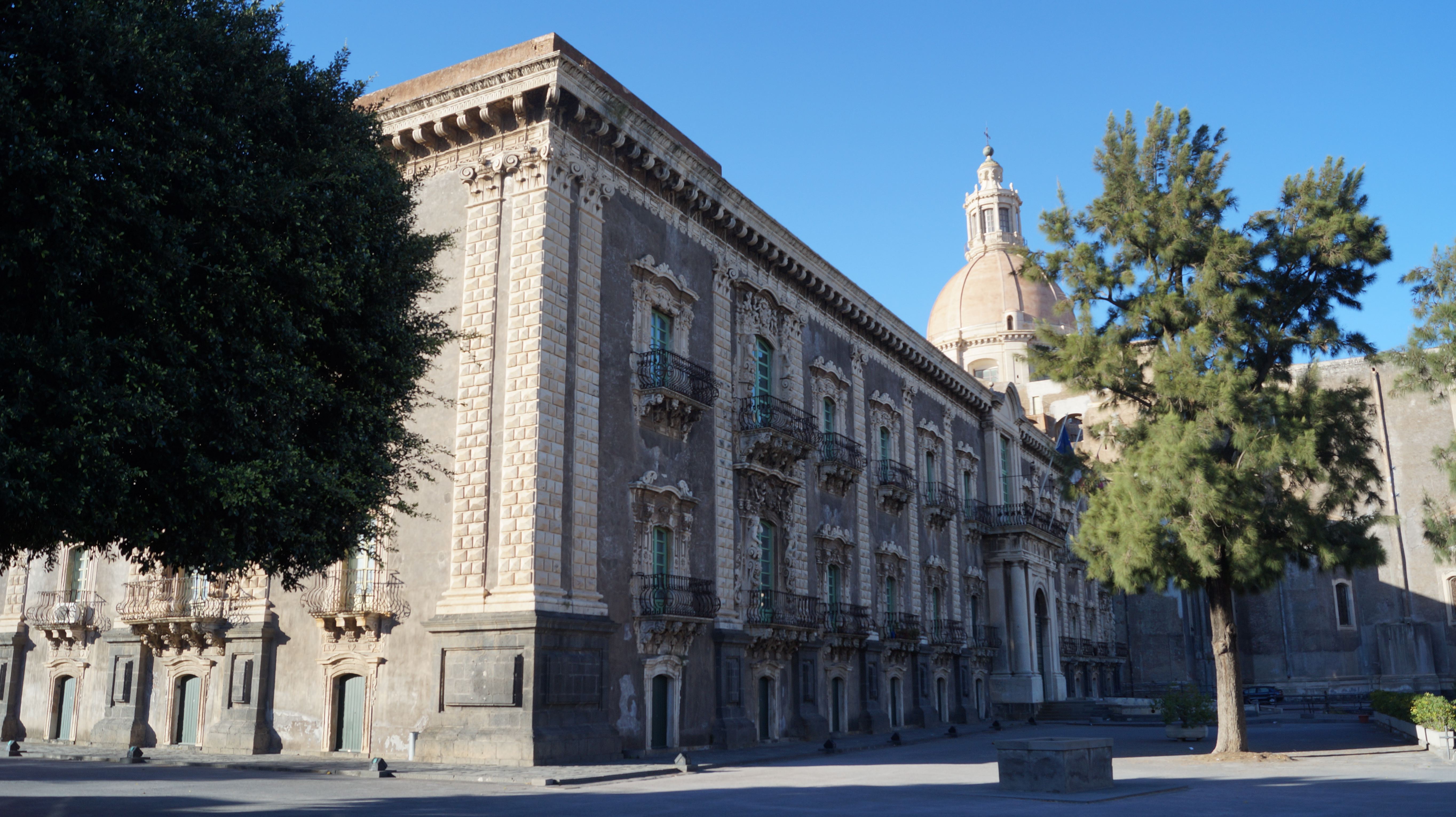 prospetto esterno